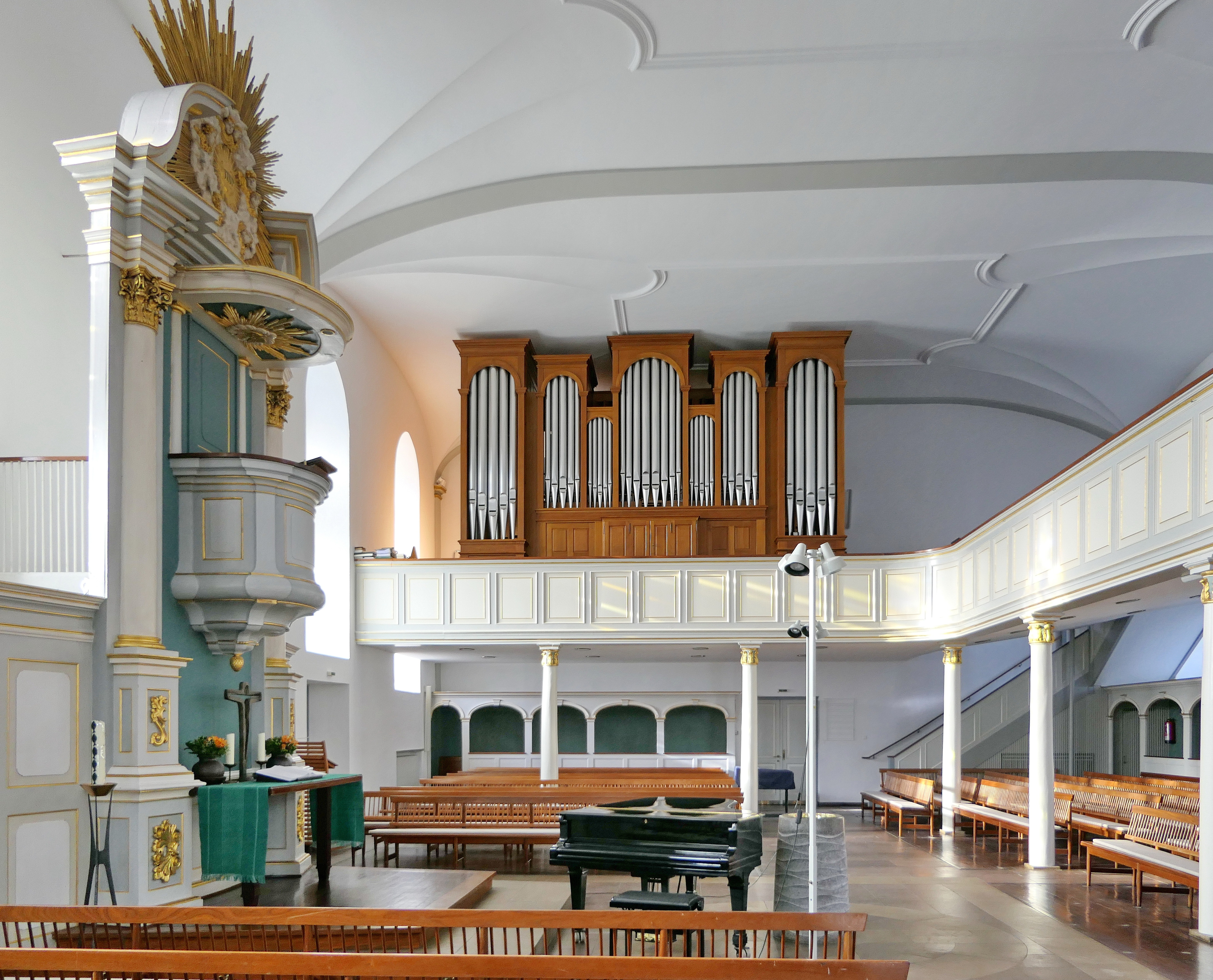 St.-Martini-Kirche (Bremen-Lesum), innen, Blick Richtung Westen